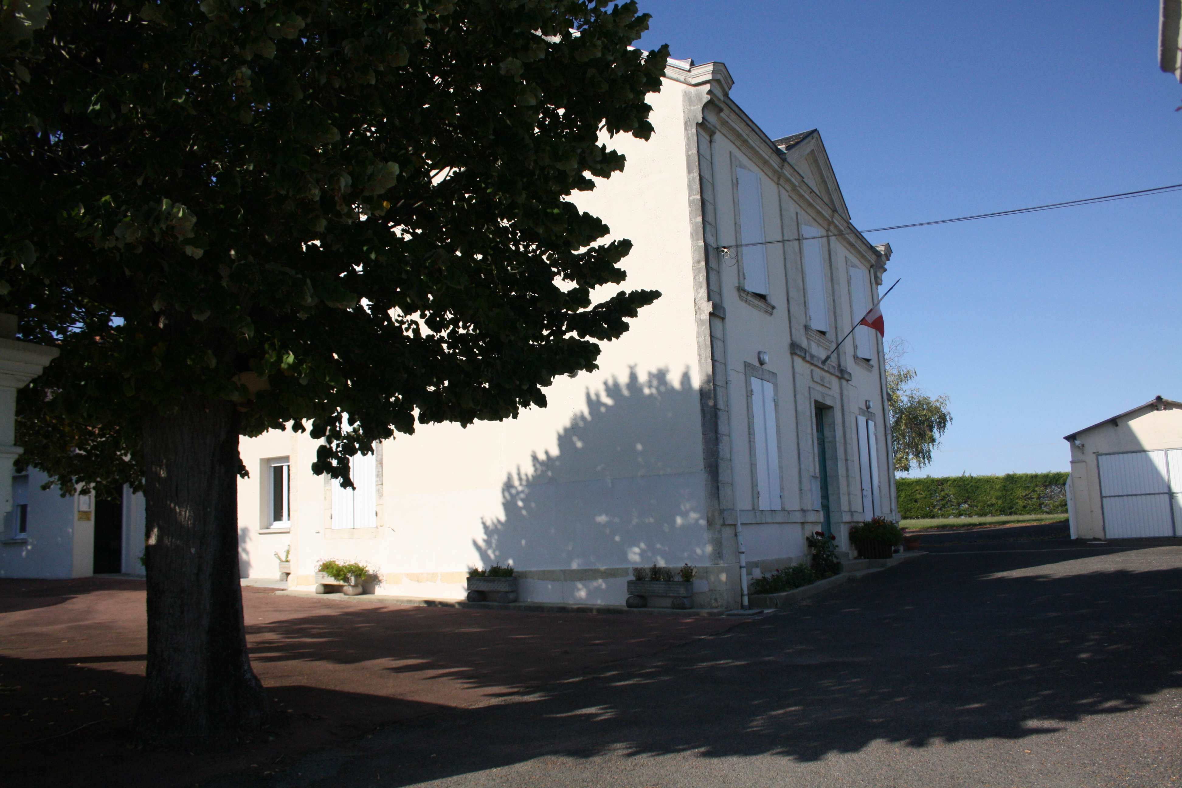 Mairie de Courcelles, Charente-Maritime (France).